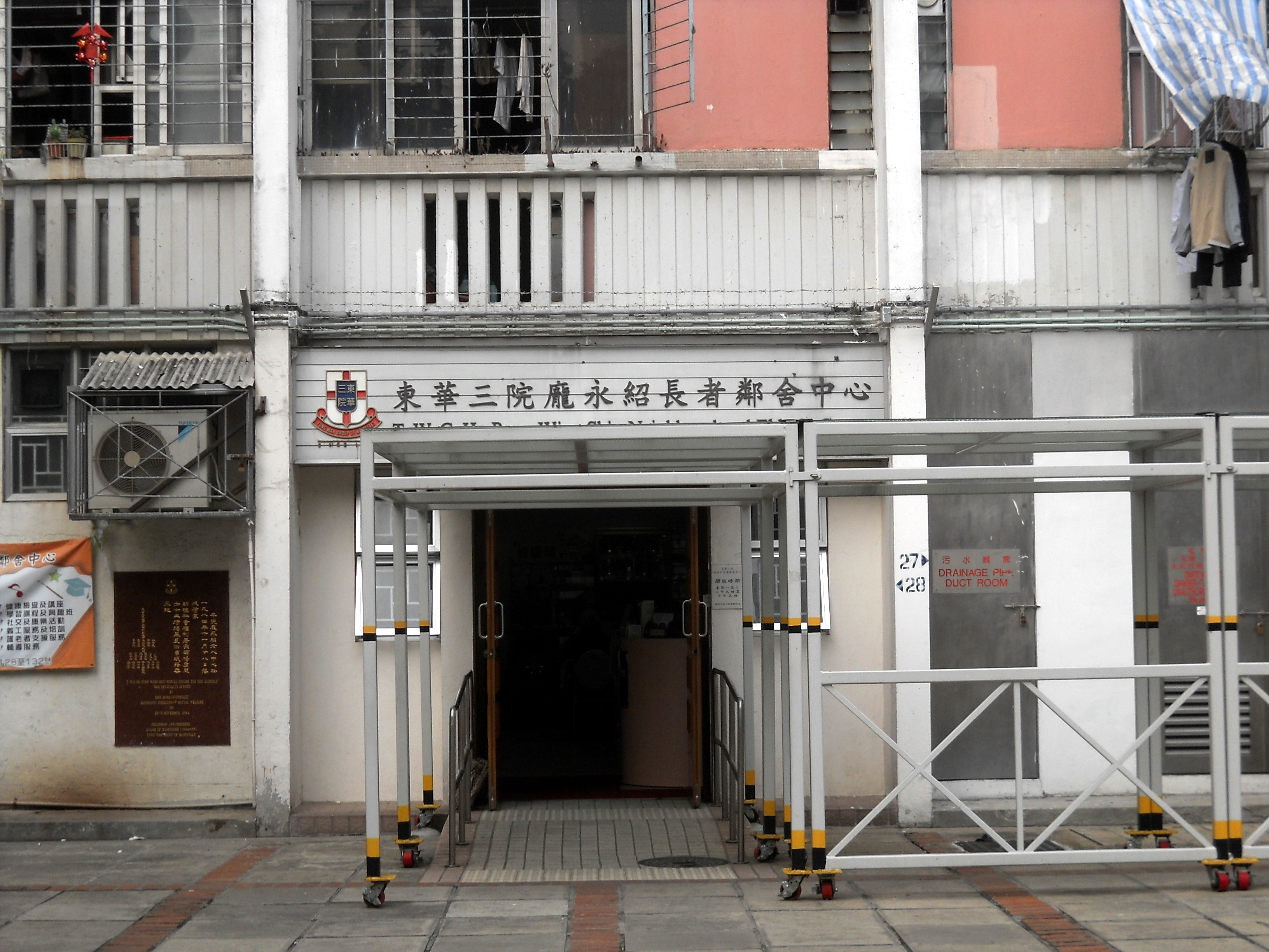 中文（香港）: 東華三院龐永紹長者鄰舍中心